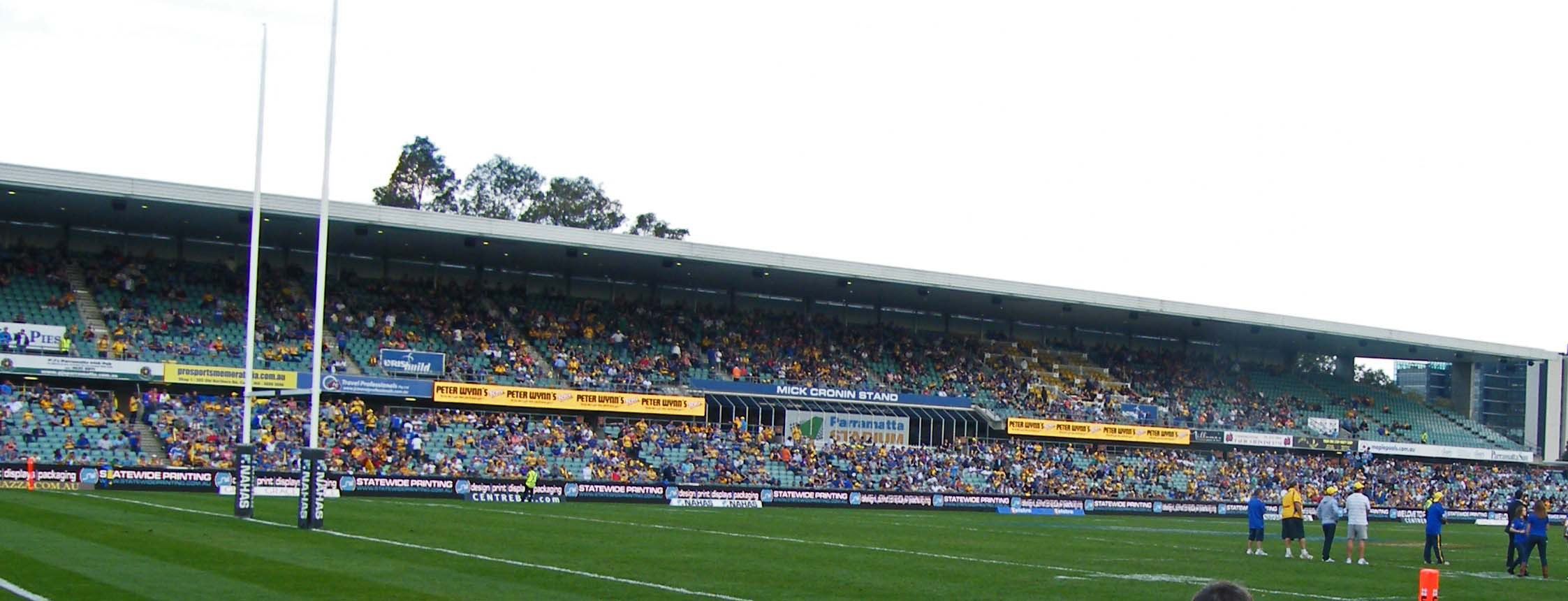 Parramatta stadium